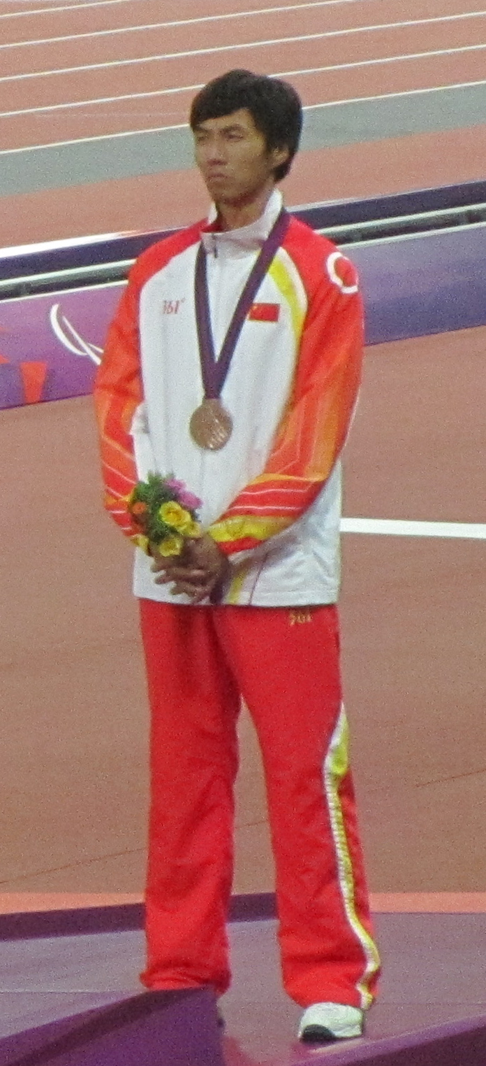 Li Yansong (China)